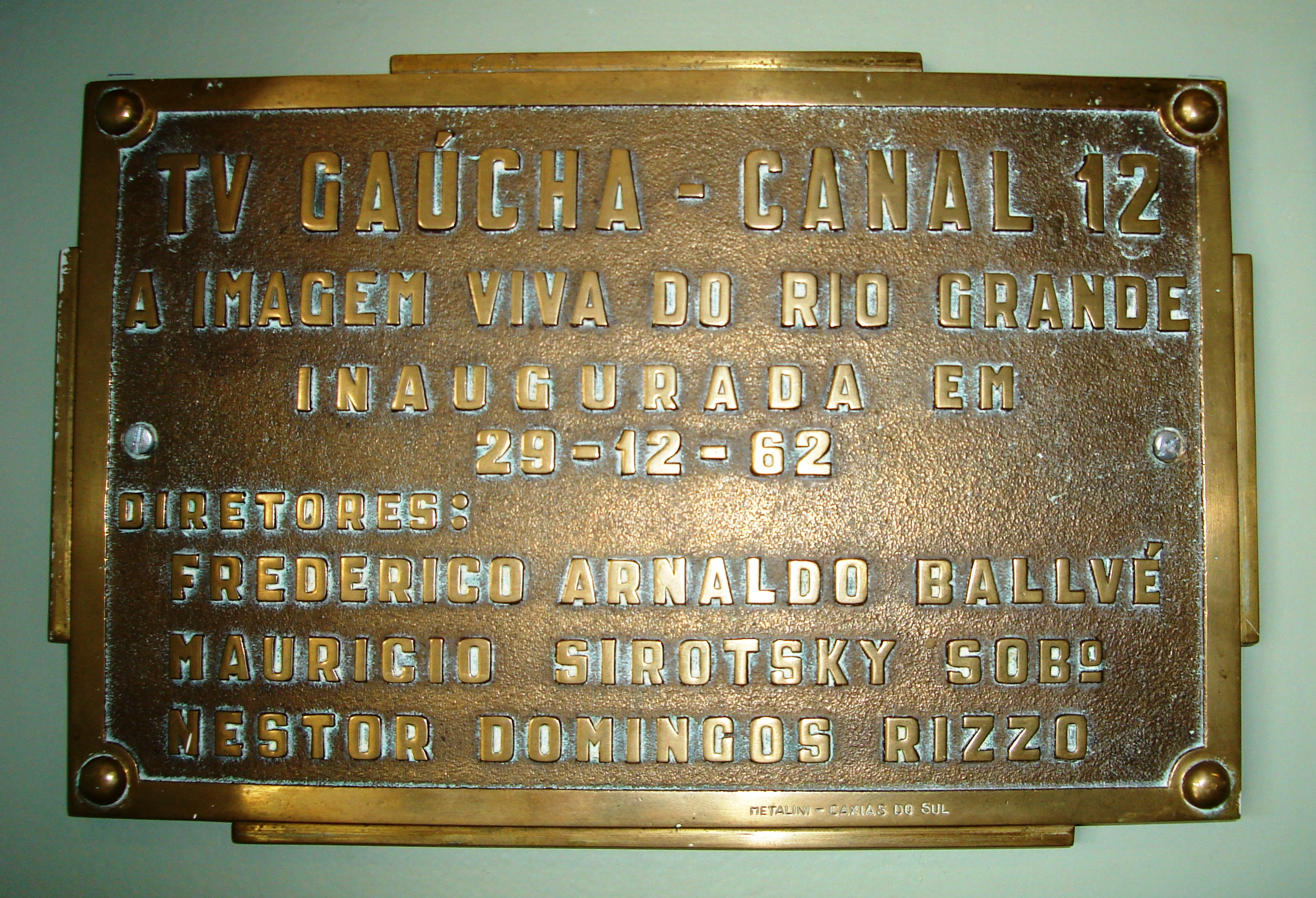 Placa de inauguração da RBS TV Porto Alegre, antigamente denominada TV Gaúcha.